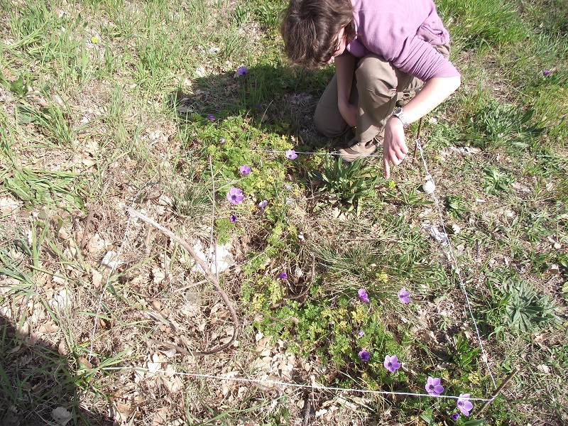 Comptage d'inflorescences d' Anemone coronaria au lieu dit Les Croisières 83720 TRANS en Provence ce 16 03 2014